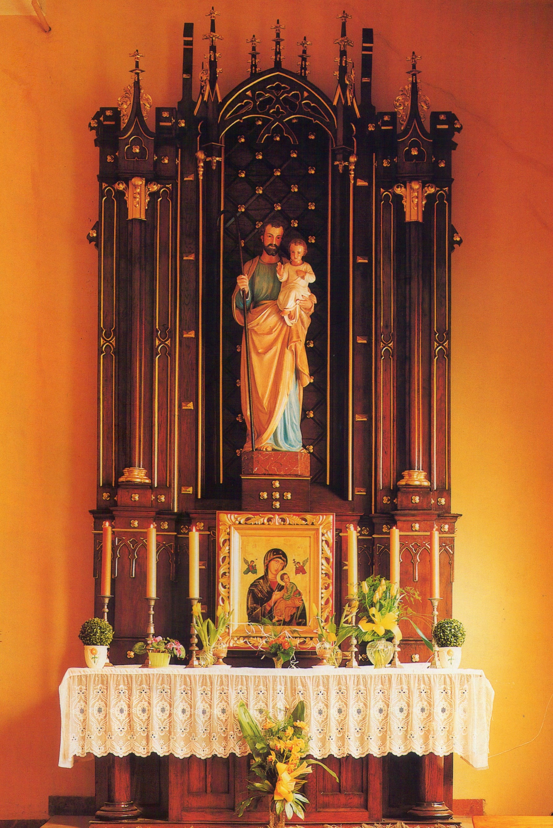 Ołtarz boczny prawy